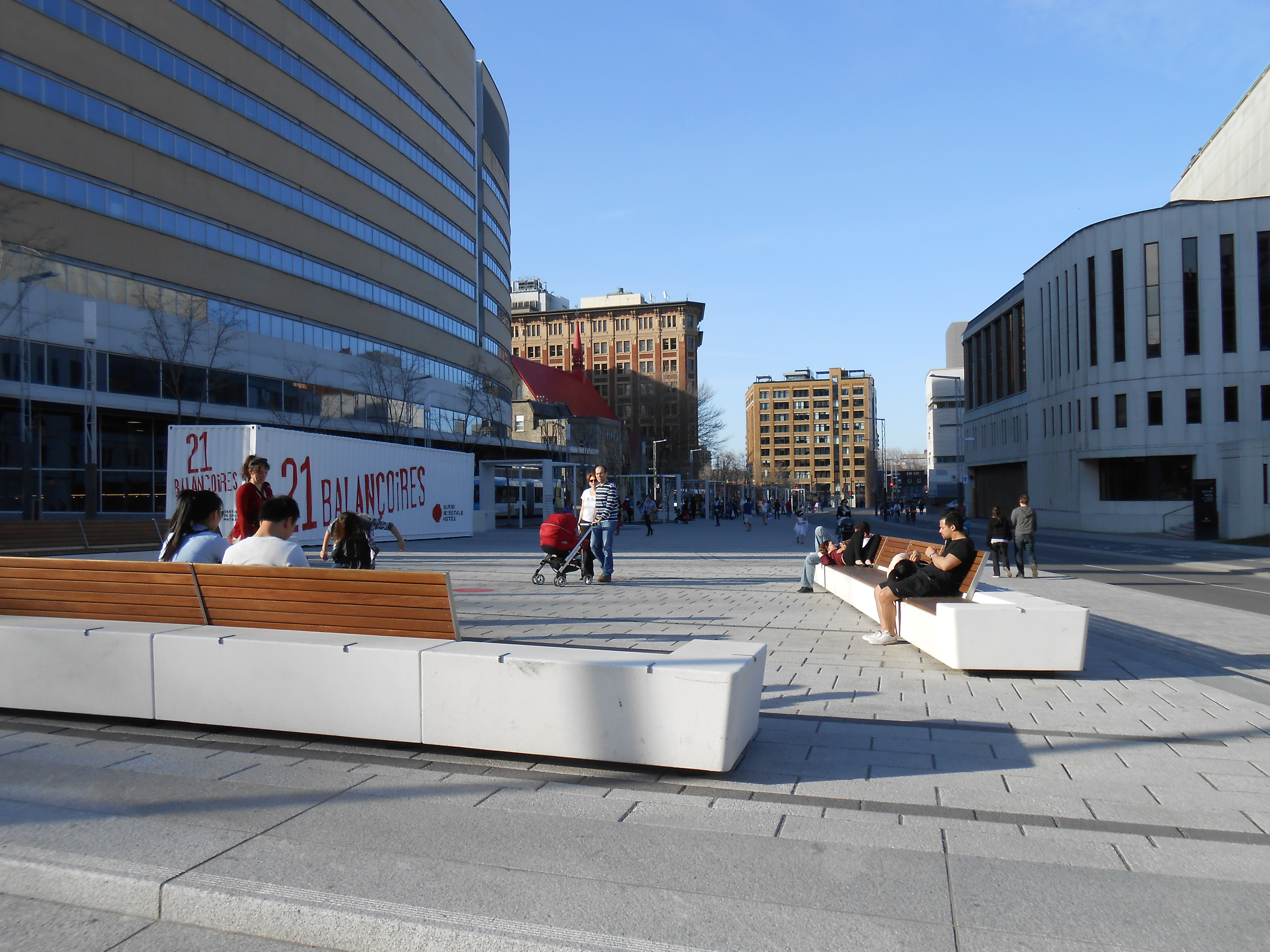 Promenade des Artistes, au nord de la Place des Arts, Montréal